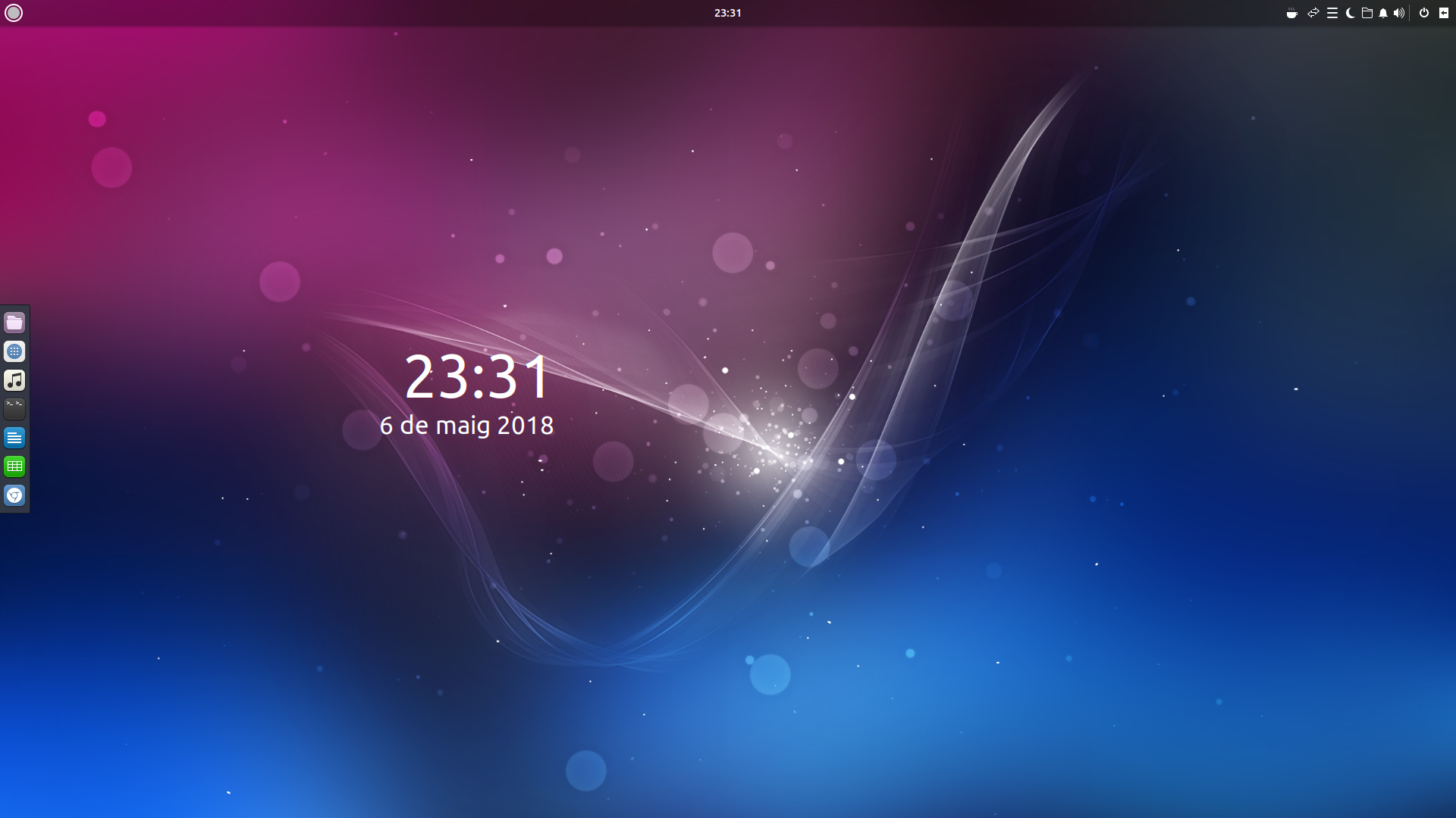 Ubuntu Budgie 18.04 LTS en Català